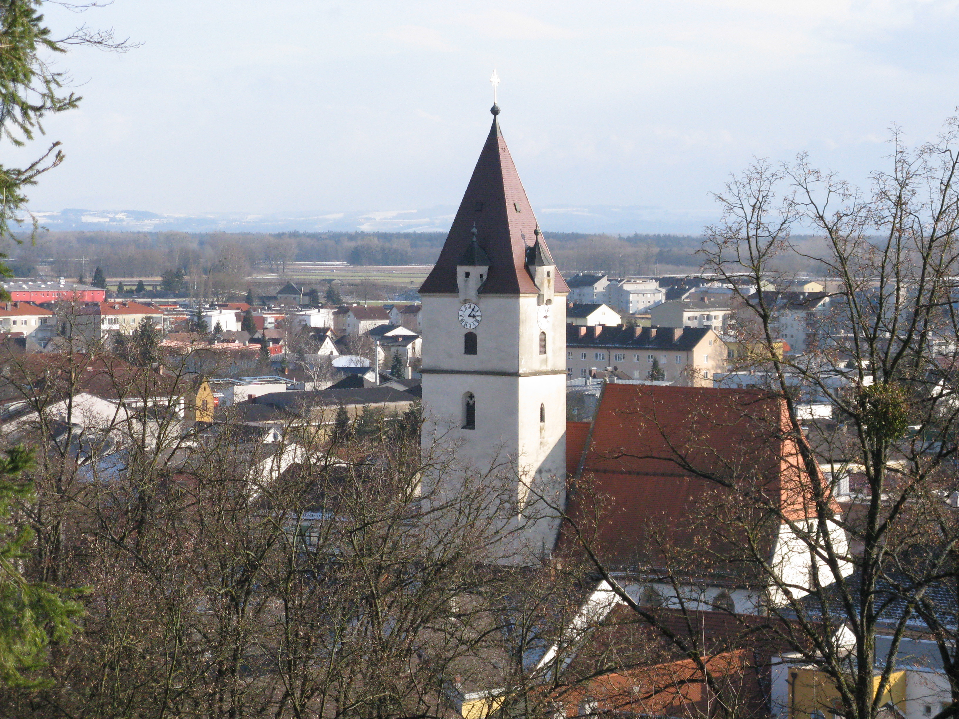 Blick auf Perg mit Stadtpfarrkirche